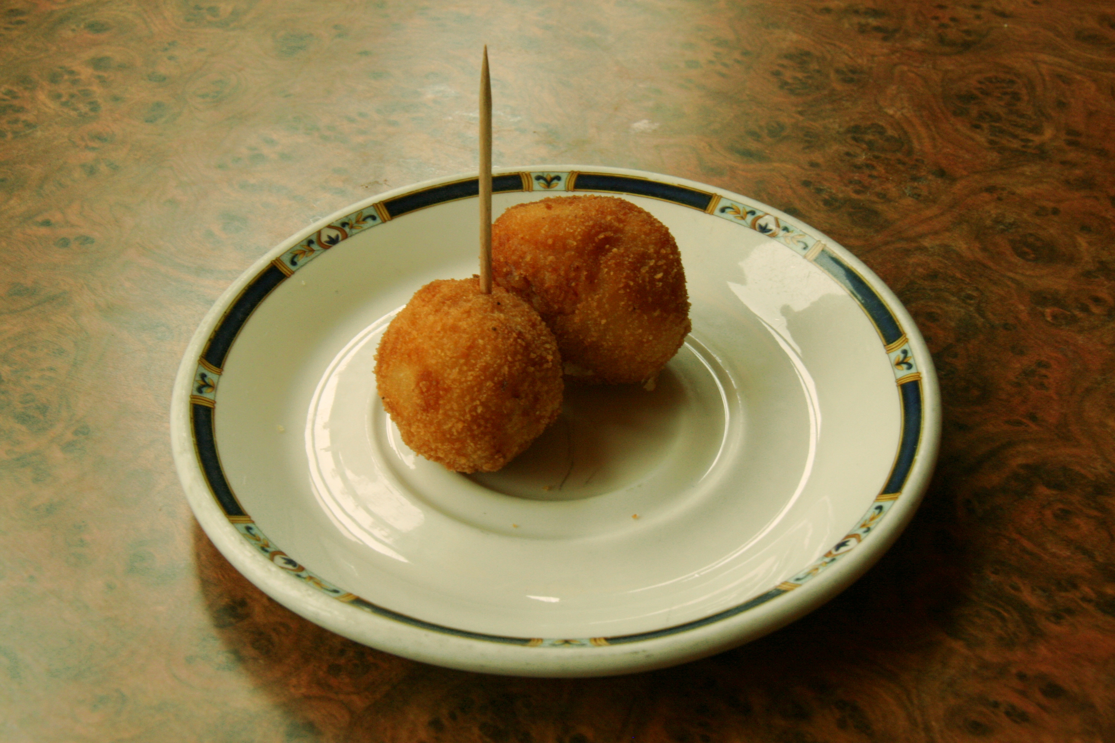 croquetas de jamón - esféricas -riofrío